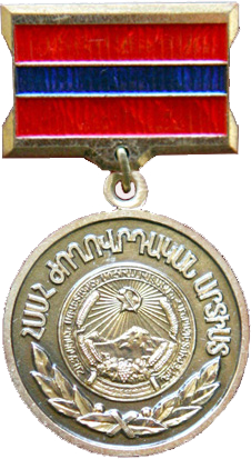 Знак к почётному званию "Народный артист Армянской ССР"